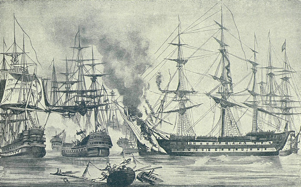 Корабль Гангут в Наваринском сражении